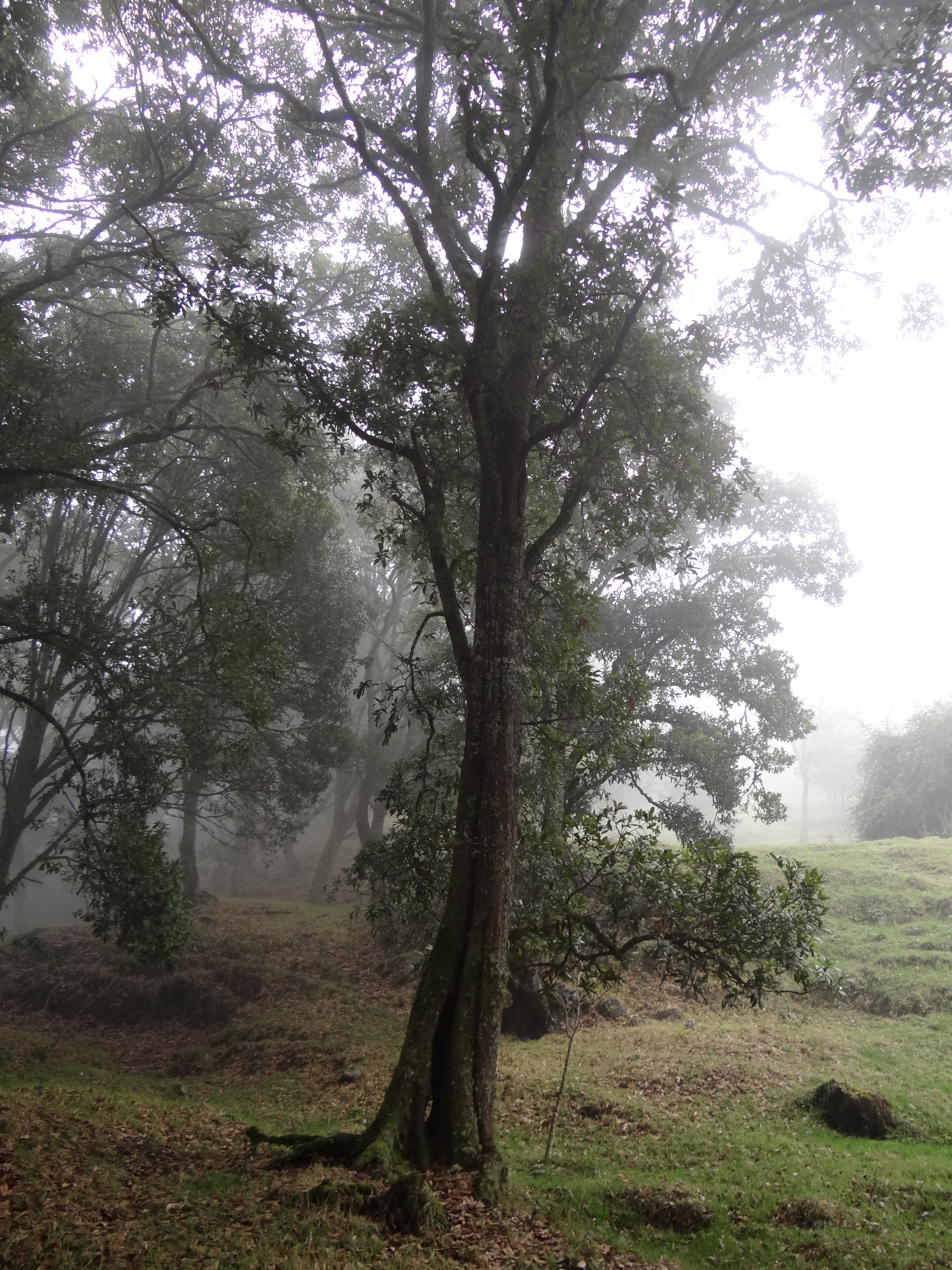 Roble colombiano (Quercus humboldtii) en Boyacá, Colombia